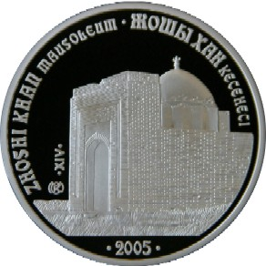 Памятная монета Республики Казахстан 2005 года. Серия "Архитектурные и исторические памятники". Реверс. 500 тенге. Серебро 925. Мавзолей Джучи-хана (Жоши-хана).